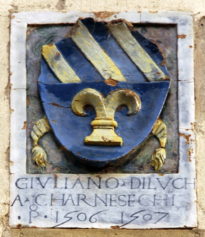 Palazzo Pretorio or Palazzo del Podestà, Galluzzo, Florence, Italy. Escutcheon - Podestà: Carnesechi. Year: 1506